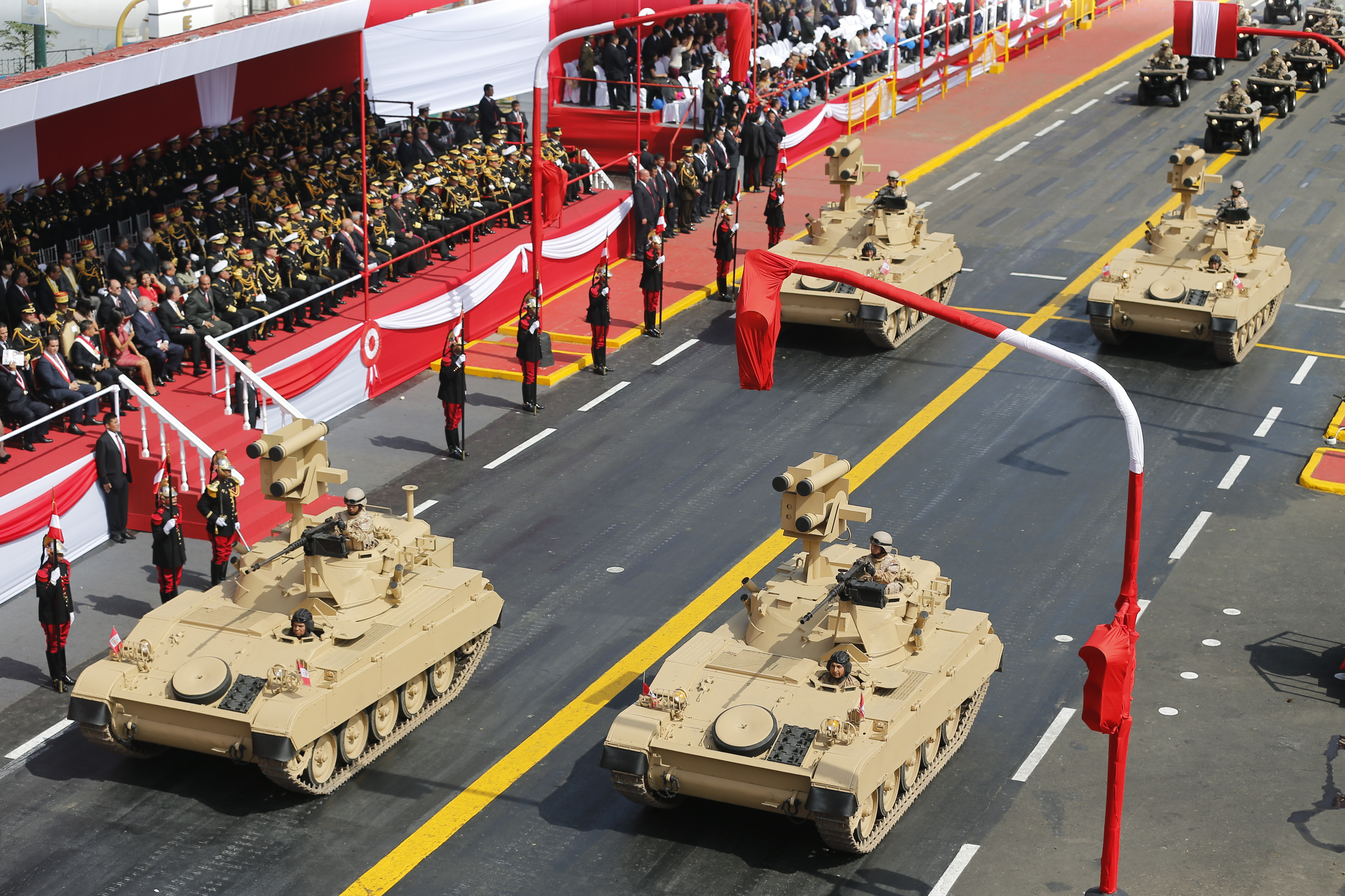 Gran Parada Militar del Perú de 2015. AMX-13 français Alacran lance-missiles antichars russes « Kornet-E ».